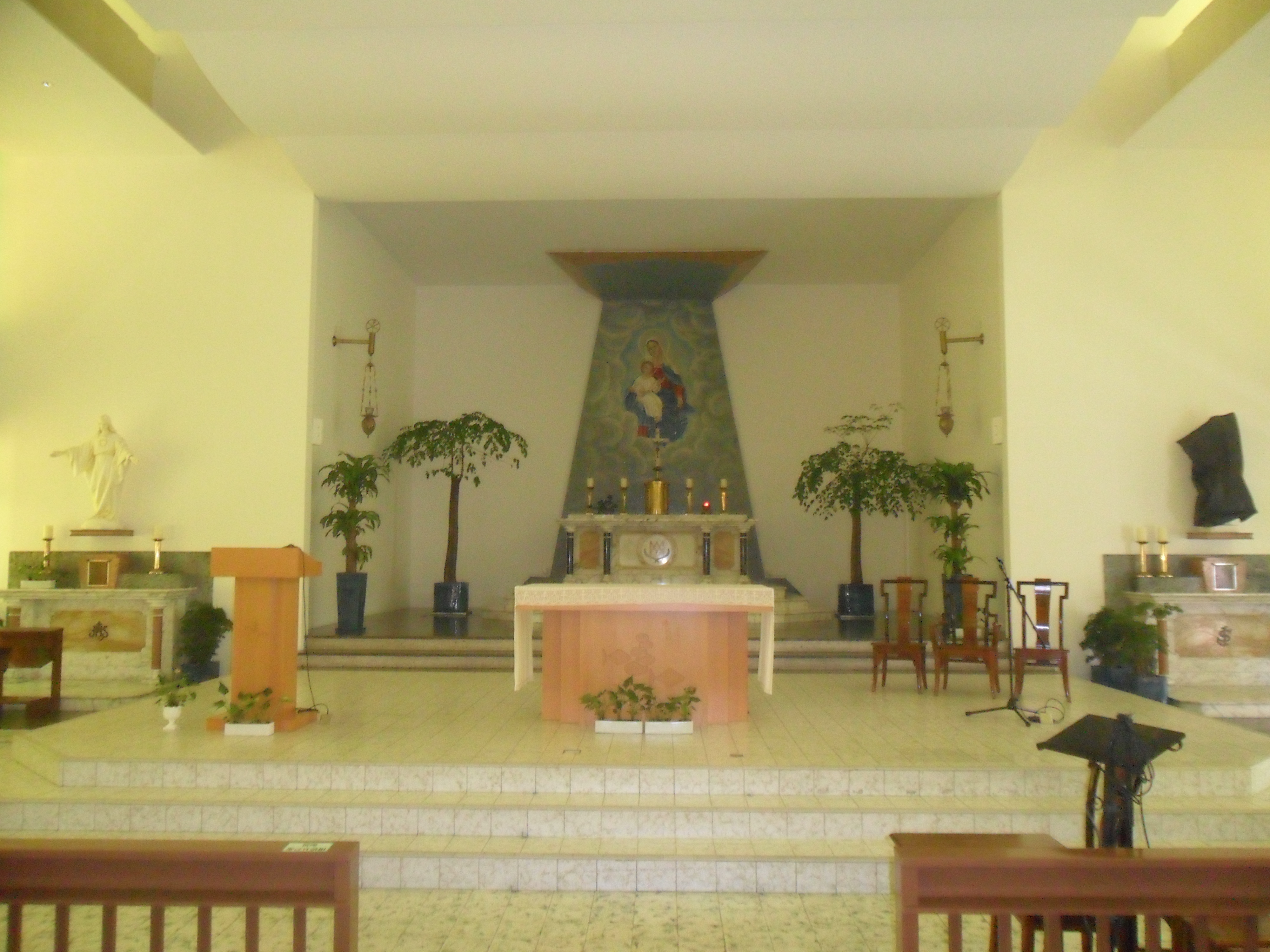 中文（香港）: 聖母玫瑰堂, 香港, 中國